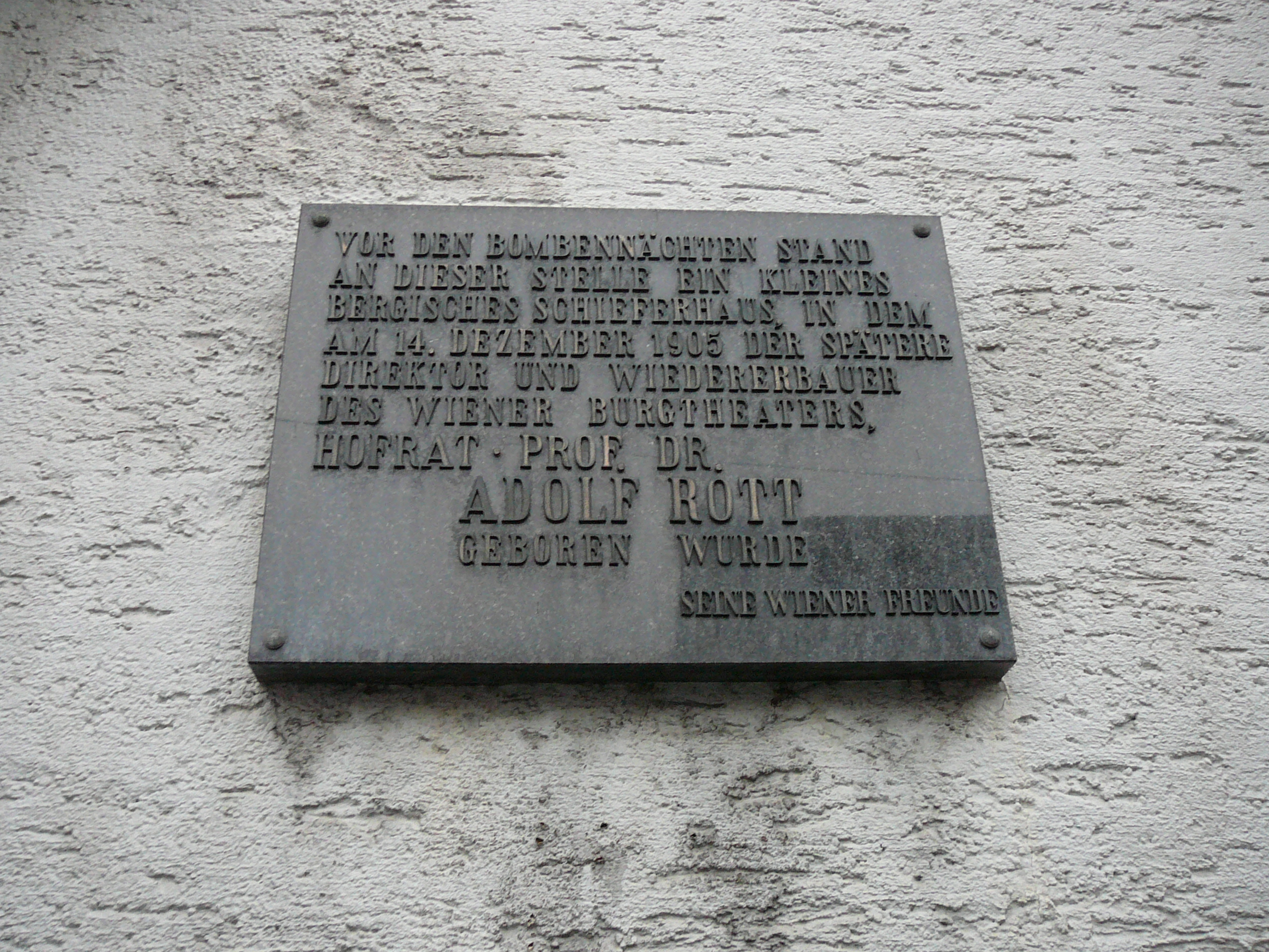 Heckinghauser Straße, Wuppertal